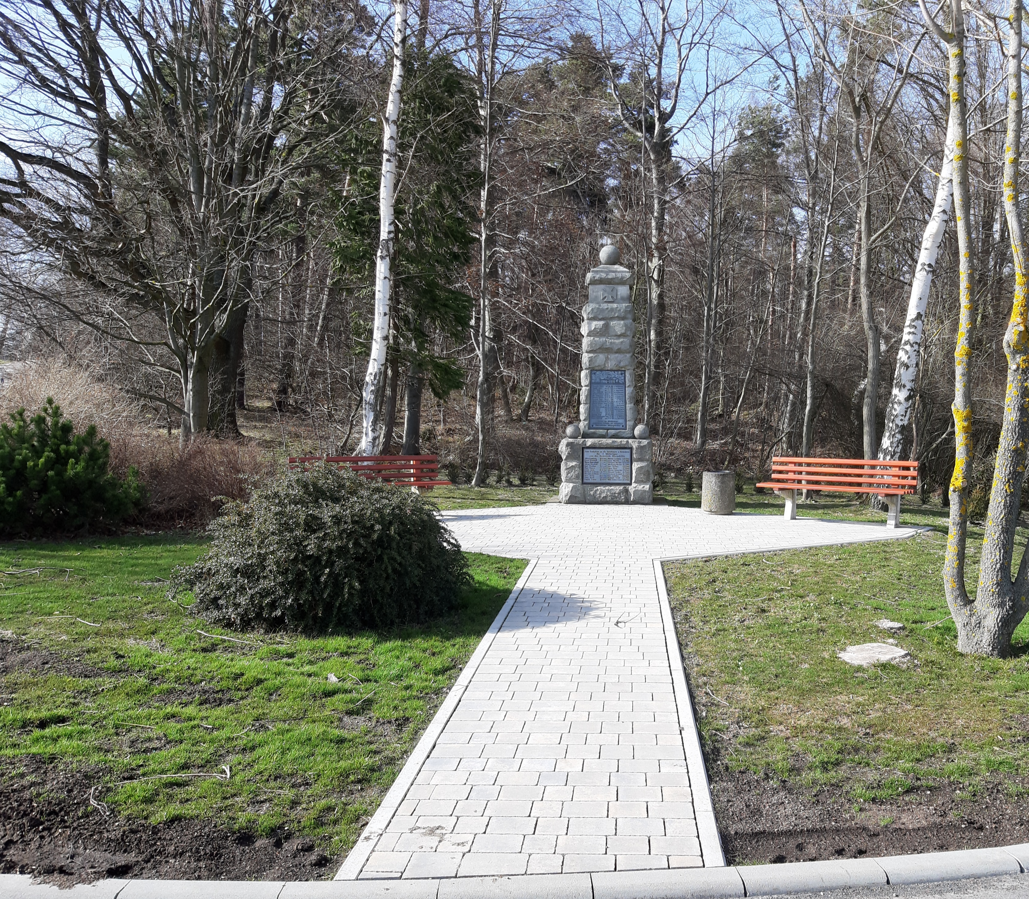 Ilmenau Oberpörlitz Kriegerdenkmal nach Neugestaltung (2019)